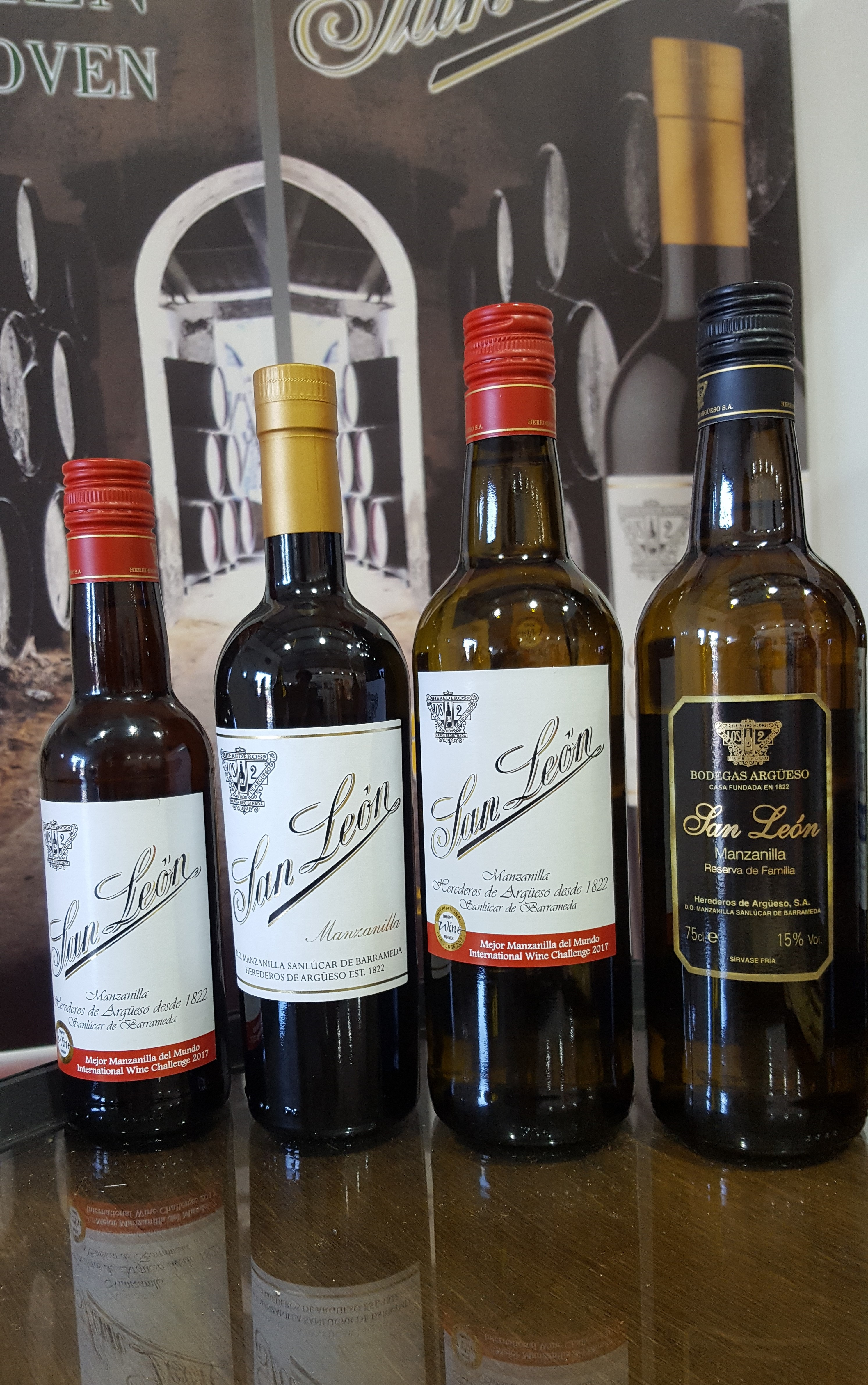 Botellas de la gama de Manzanilla san León